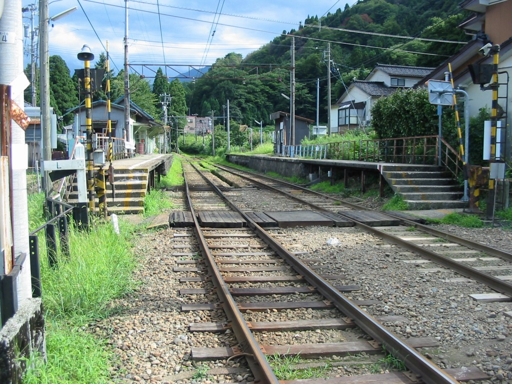 富山地方鉄道内山駅